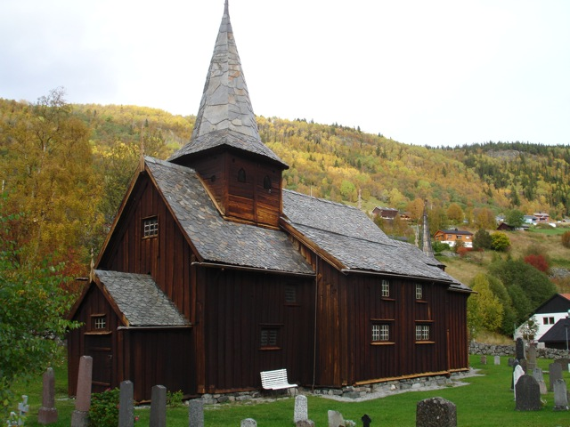 Bilete Hol gamle kyrkje